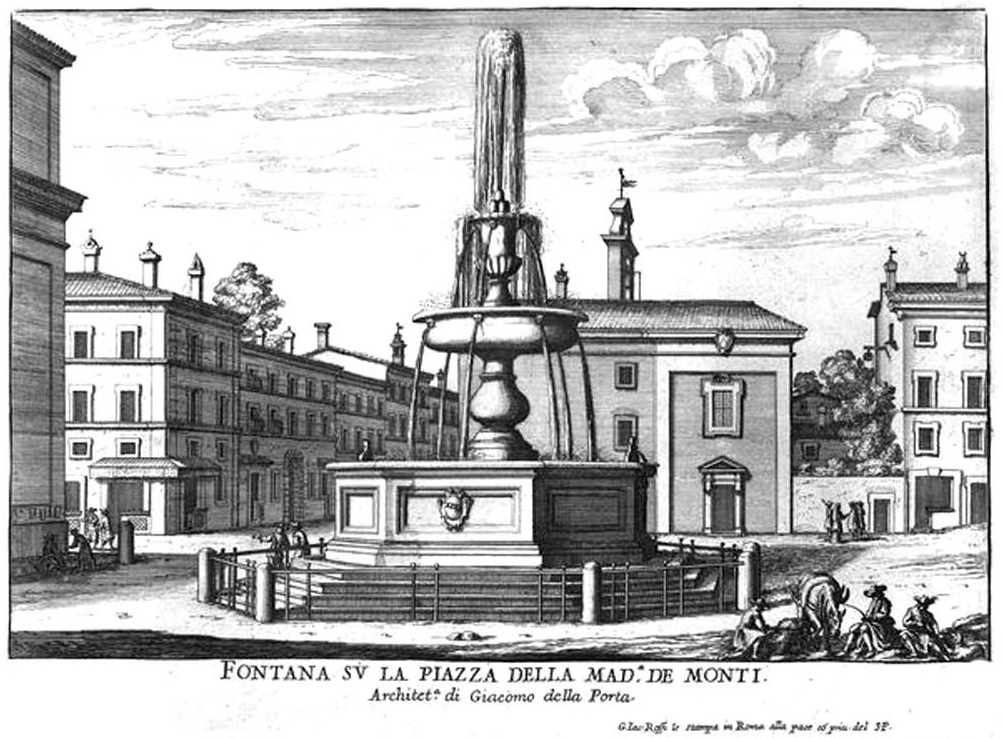 Fontana su la Piazza della Madonna de Monti by Giovanni Battista Falda (17th-cent.)